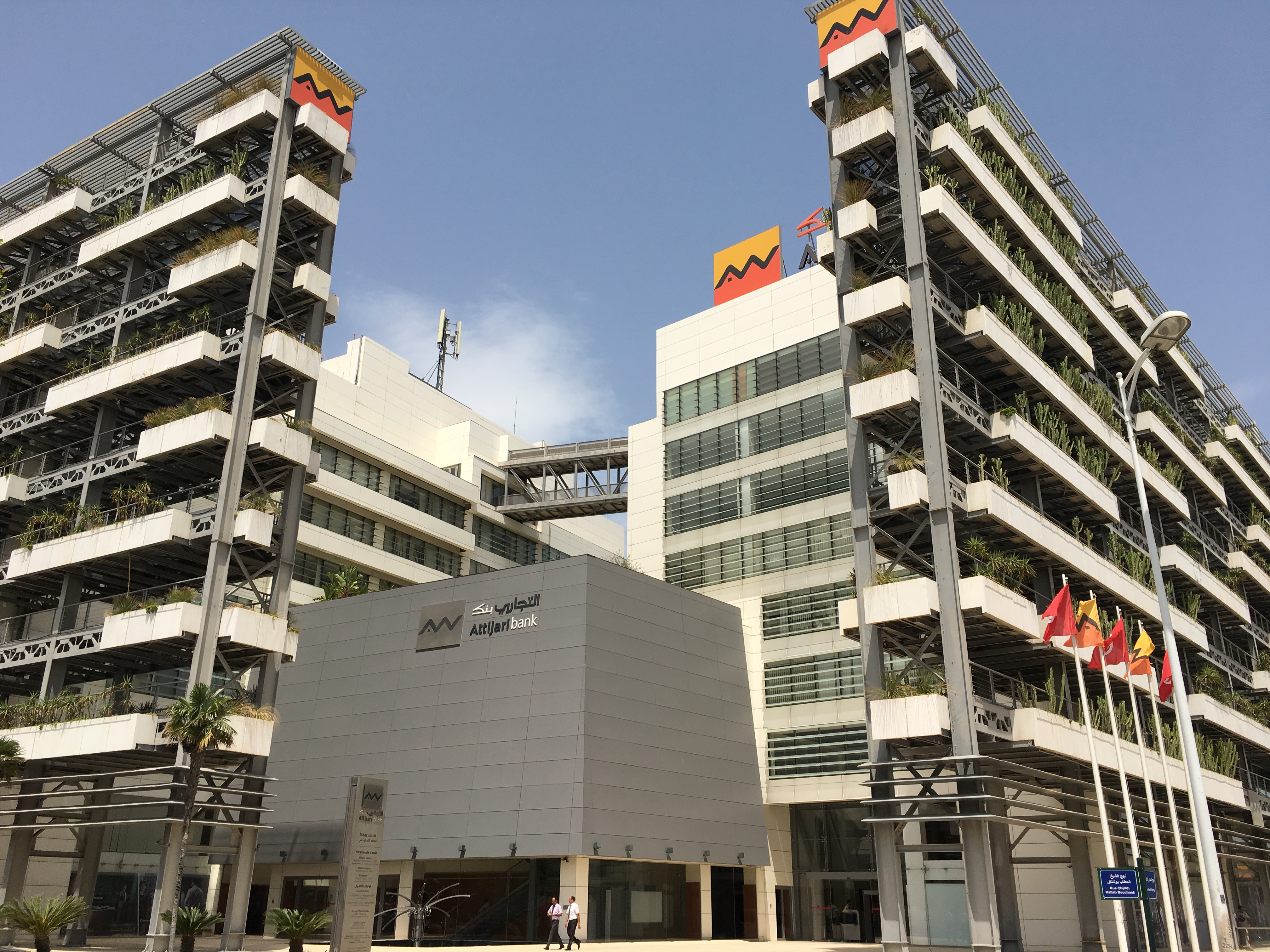 Siège d'Attijari Bank, Centre Urbain Nord, Tunis, 2019.